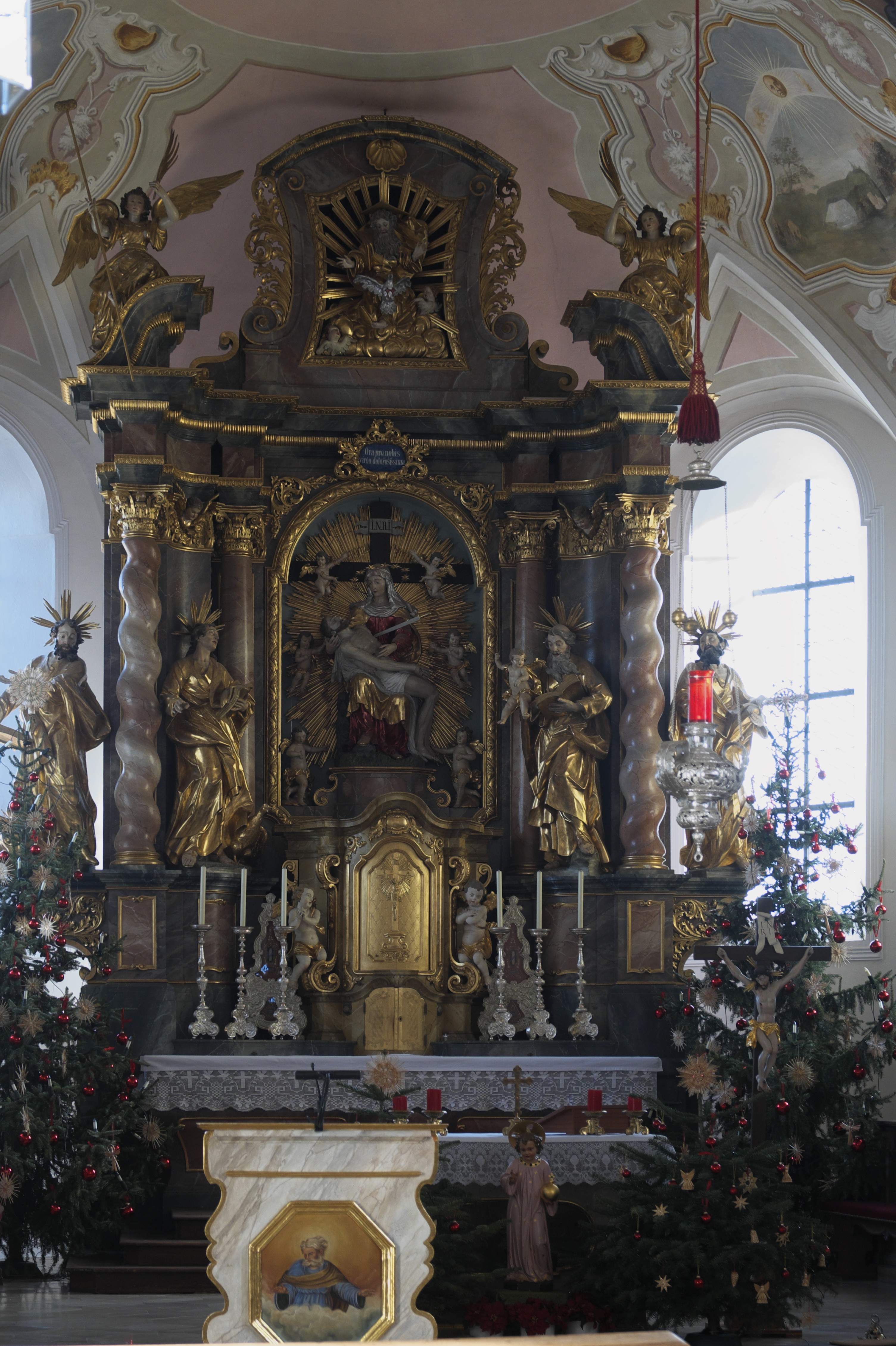 Katholische Pfarrkirche Mariä Heimsuchung in Gosseltshausen (Wolnzach) im Landkreis Pfaffenhofen an der Ilm (Bayern/Deutschland), Hochaltar